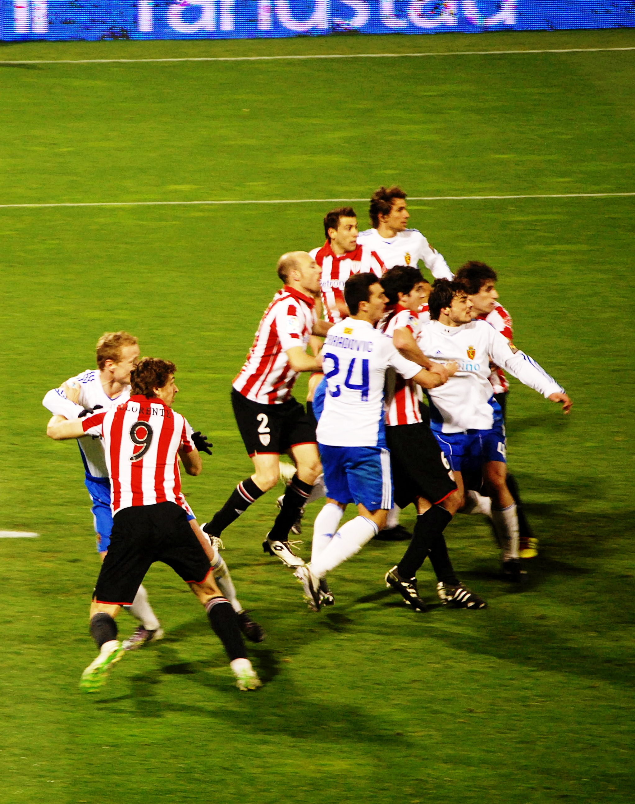 Fernando Llorente Torres (dorsal número 9) jugando un partido con el Athletic de Bilbao frente al Real Zaragoza